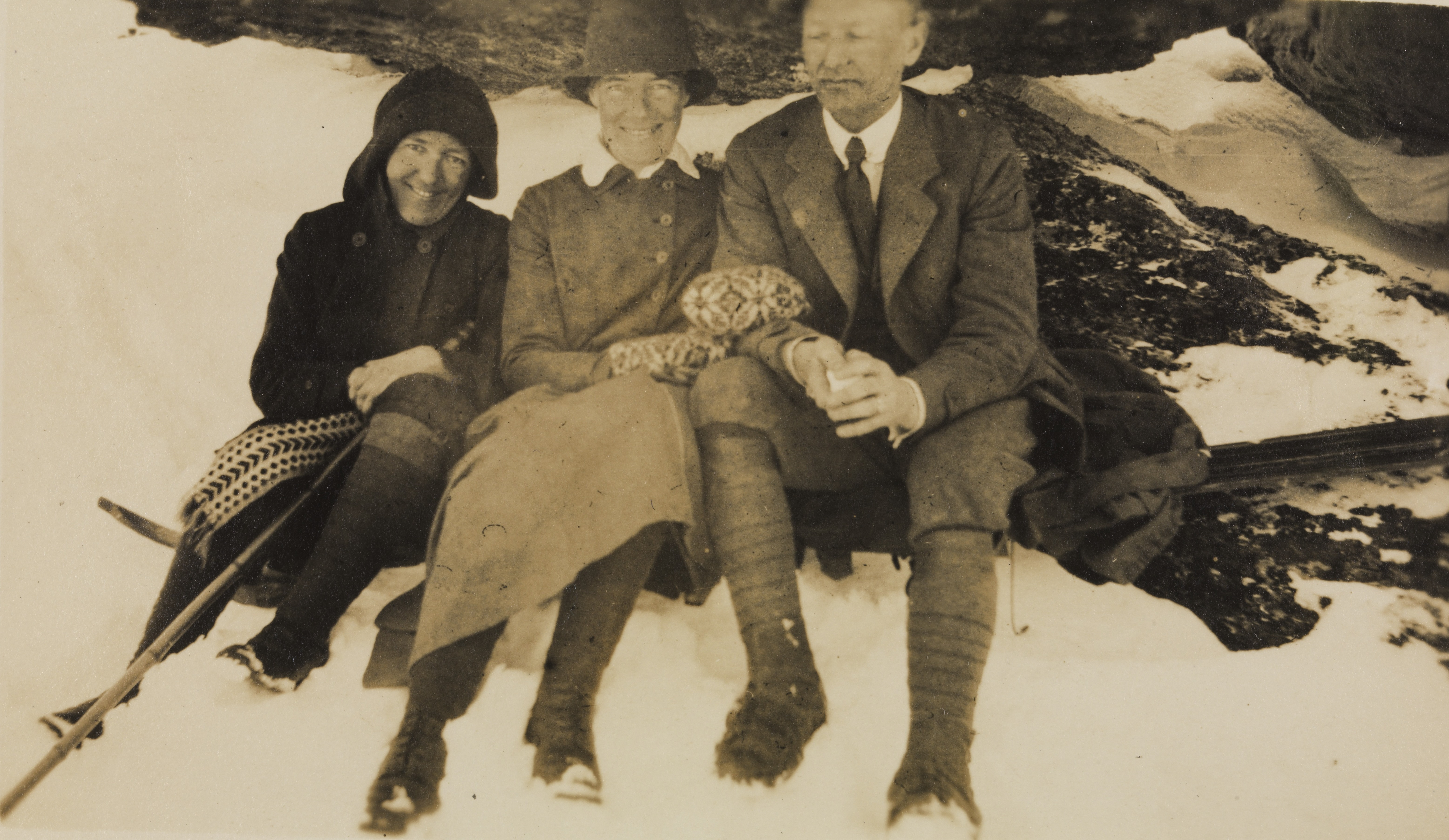 Fra venstre to damer (i midten Dagny Knudsen) og Bjørn Helland-Hansen, etter at de har vært på en skitur i snøstorm, i nærheten av Finse hotel. Depicted person: Knudsen, Dagny Depicted person: Helland-Hansen, Bjørn (1877-1957) Depicted place: Hordaland, Hardanger, Finse